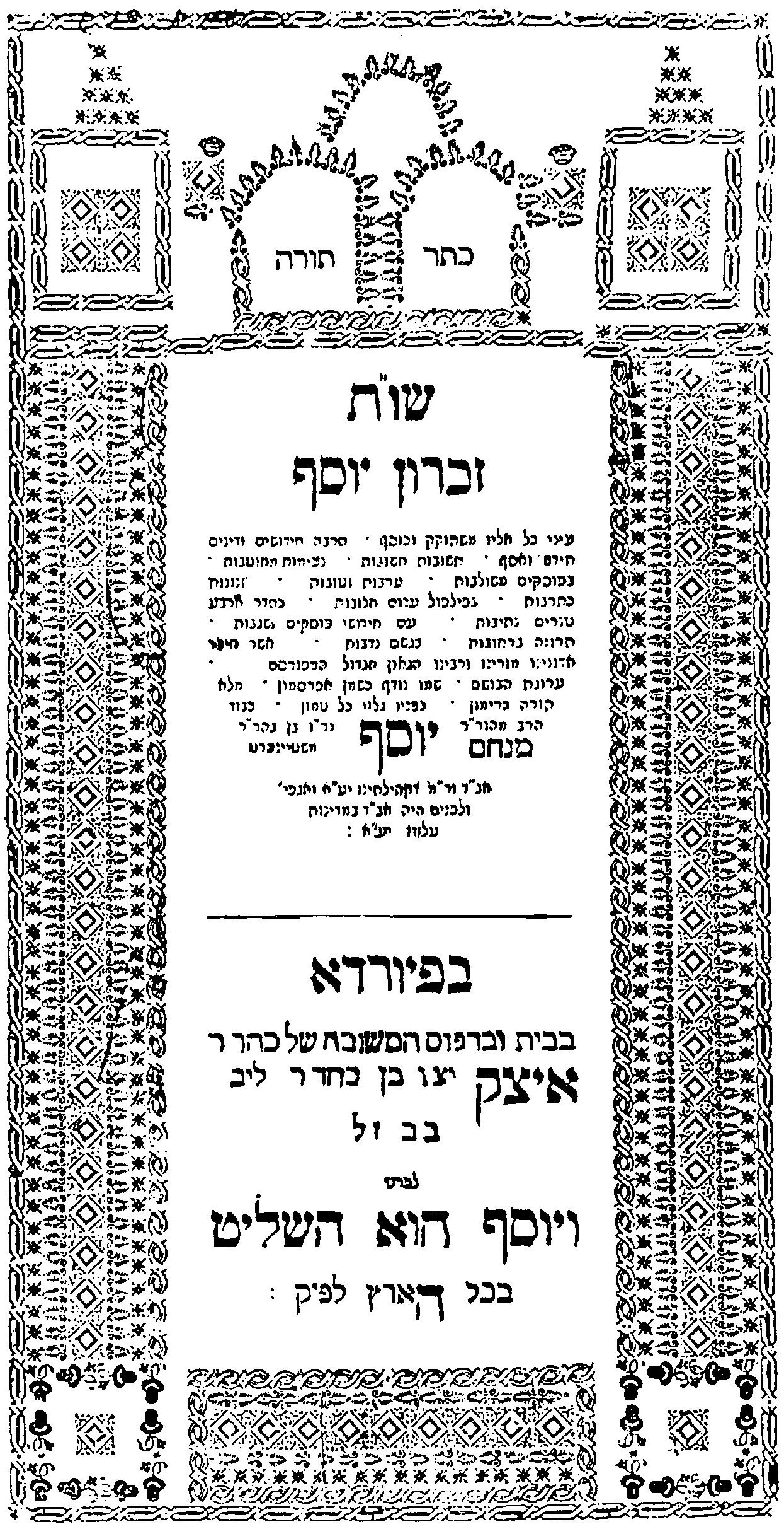 שער לספר זכרון יוסף.